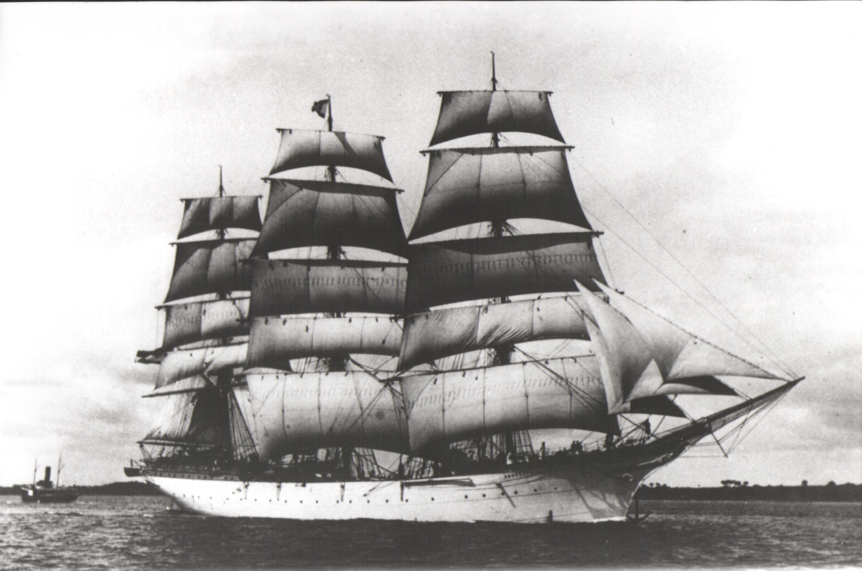 Le trois-mâts carré Grossherzogin Elisabeth (futur Duchesse Anne - Dunkerque)